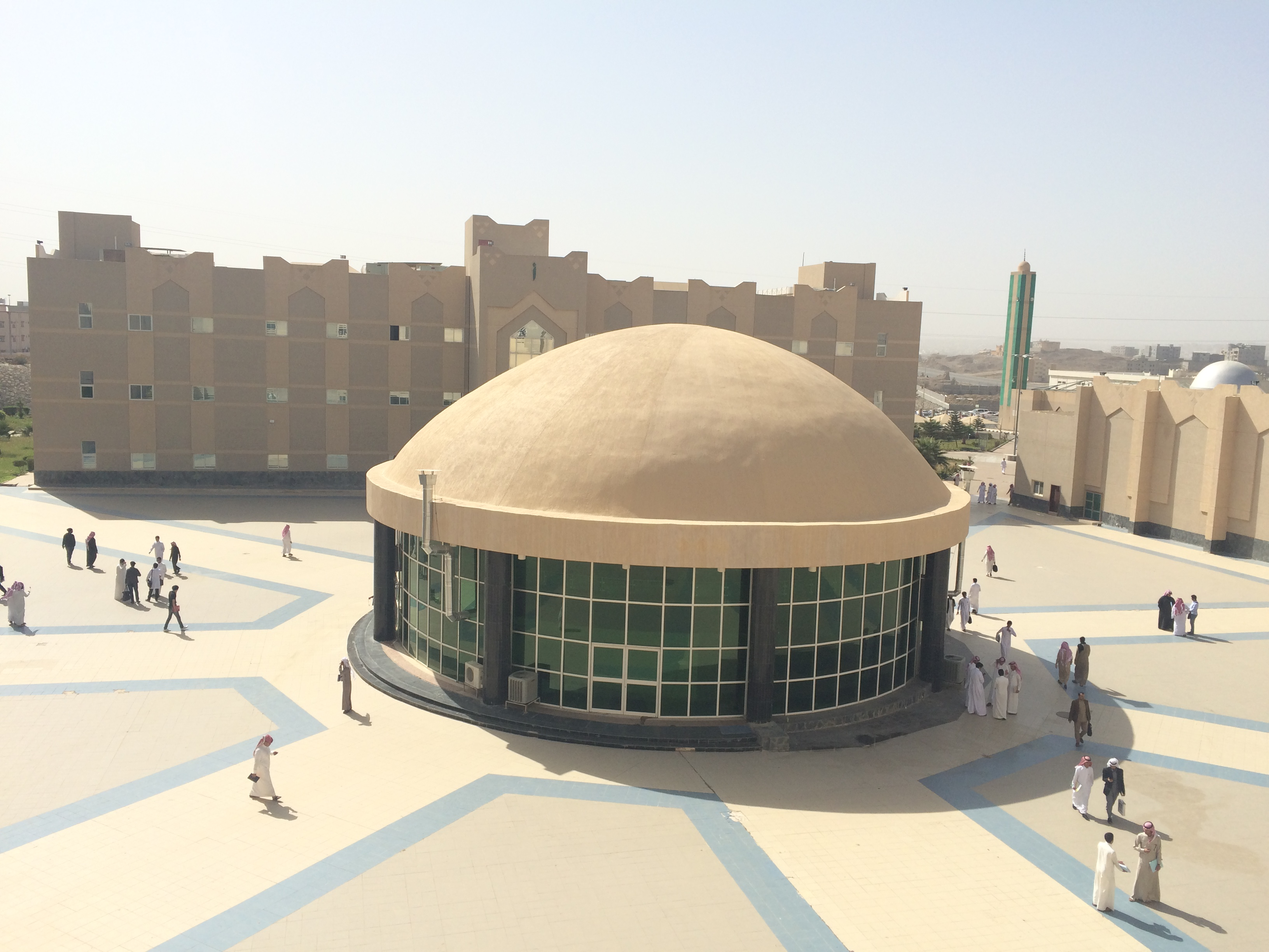 جامعة الملك خالد - المجمع الأكاديمي بالمحالة صورة من المبنى ج